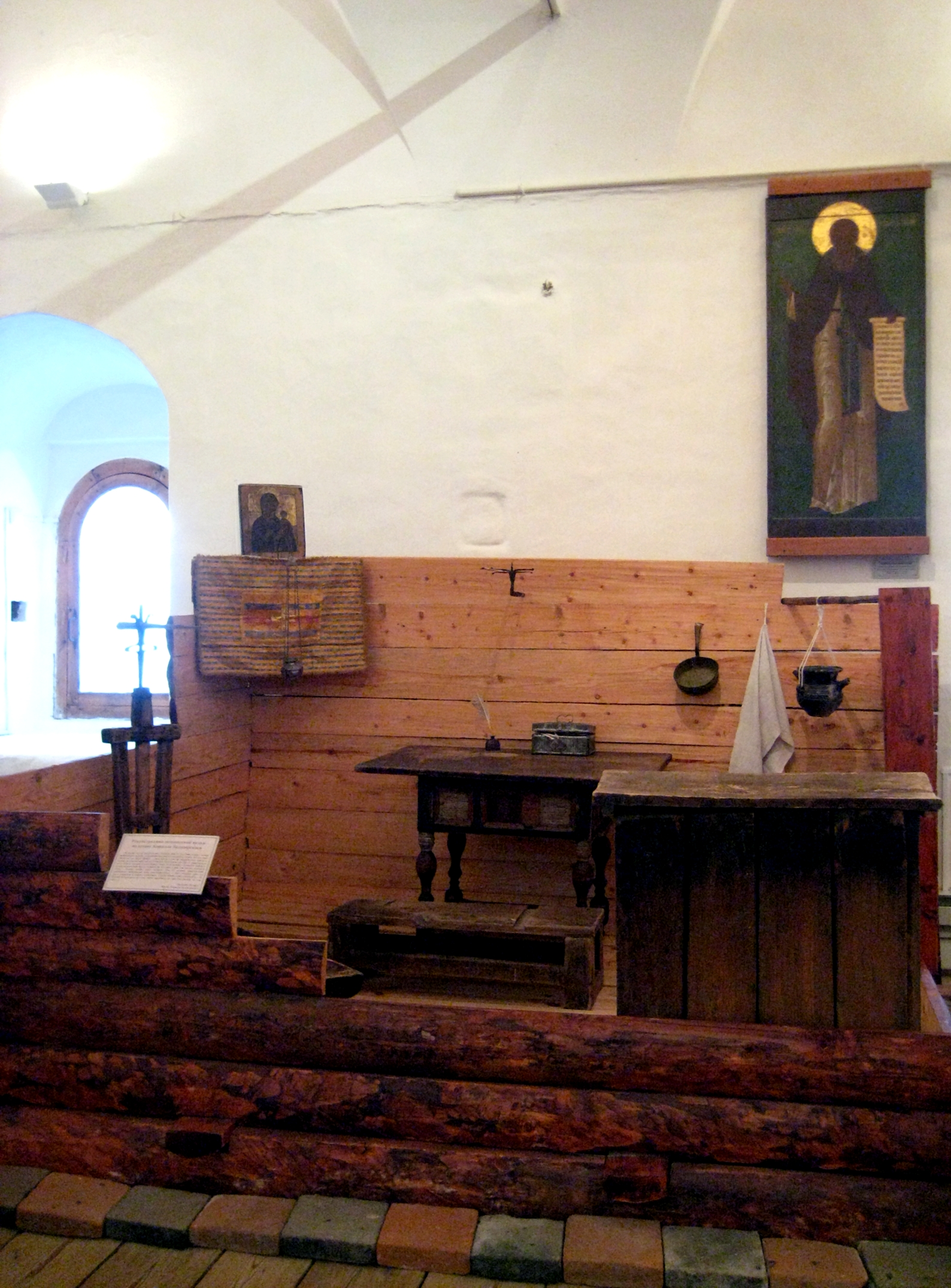 Реконструкция монашеской кельи по уставу Кирилла Белозерского